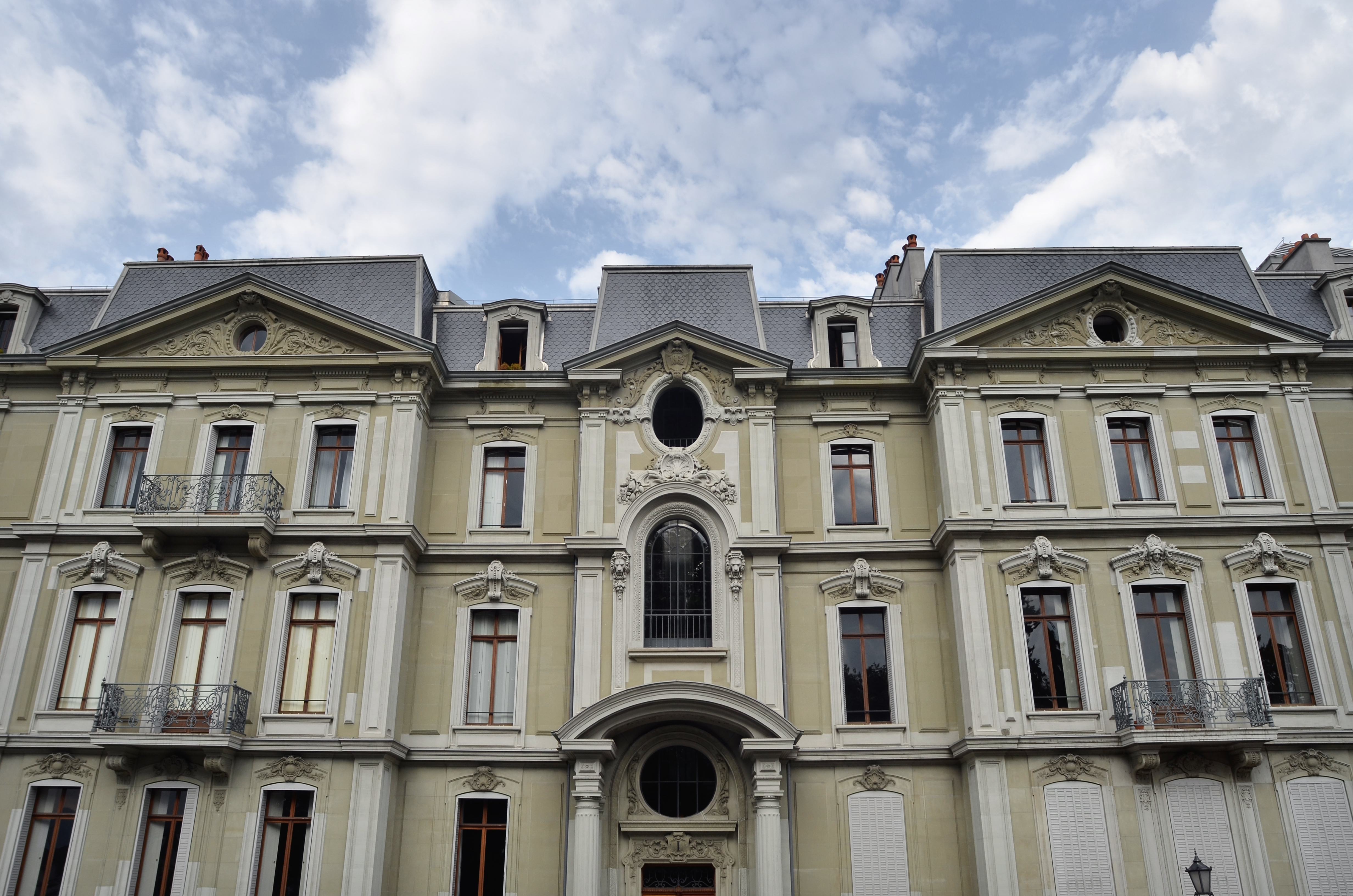 Immeubles 1-3 Promenade du Pin (Genève, Suisse)